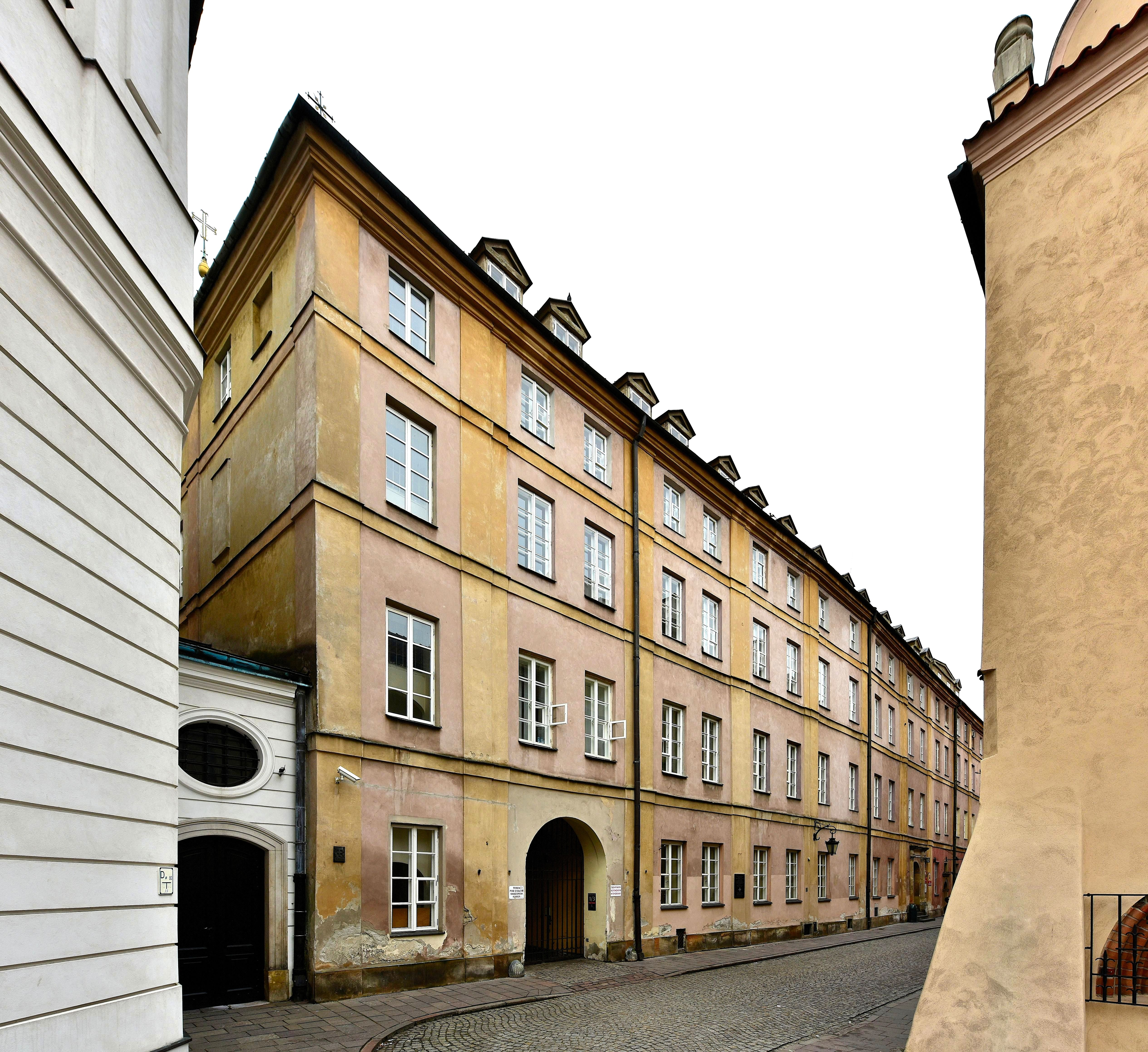 Zespół kamienic przy ul. Jezuickiej 1/3 w Warszawie